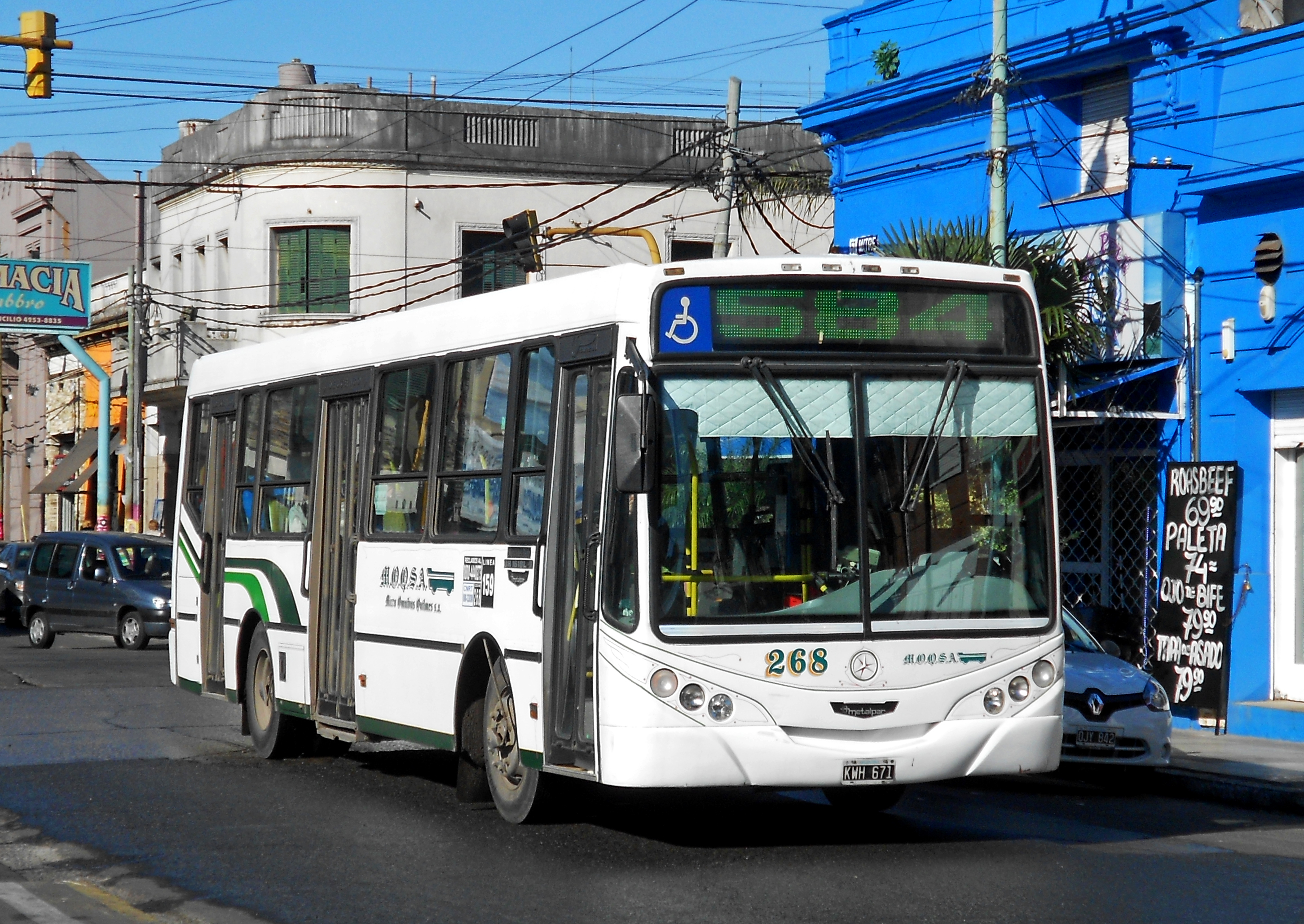 Interno de la línea 584 circulando por la calle Mitre, en Quilmes.